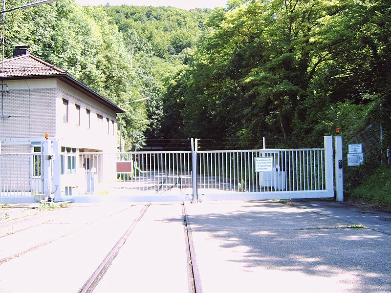 Gipsstollen, Bahn-, Bus-, und Schwerlasteinfahrt